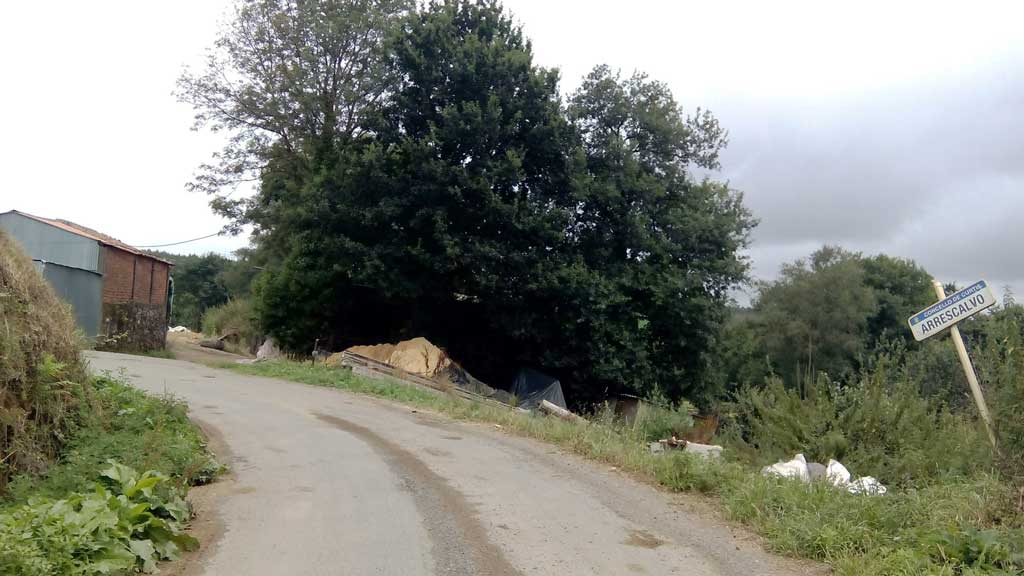 Vista de Arrescalvo, Curtis.